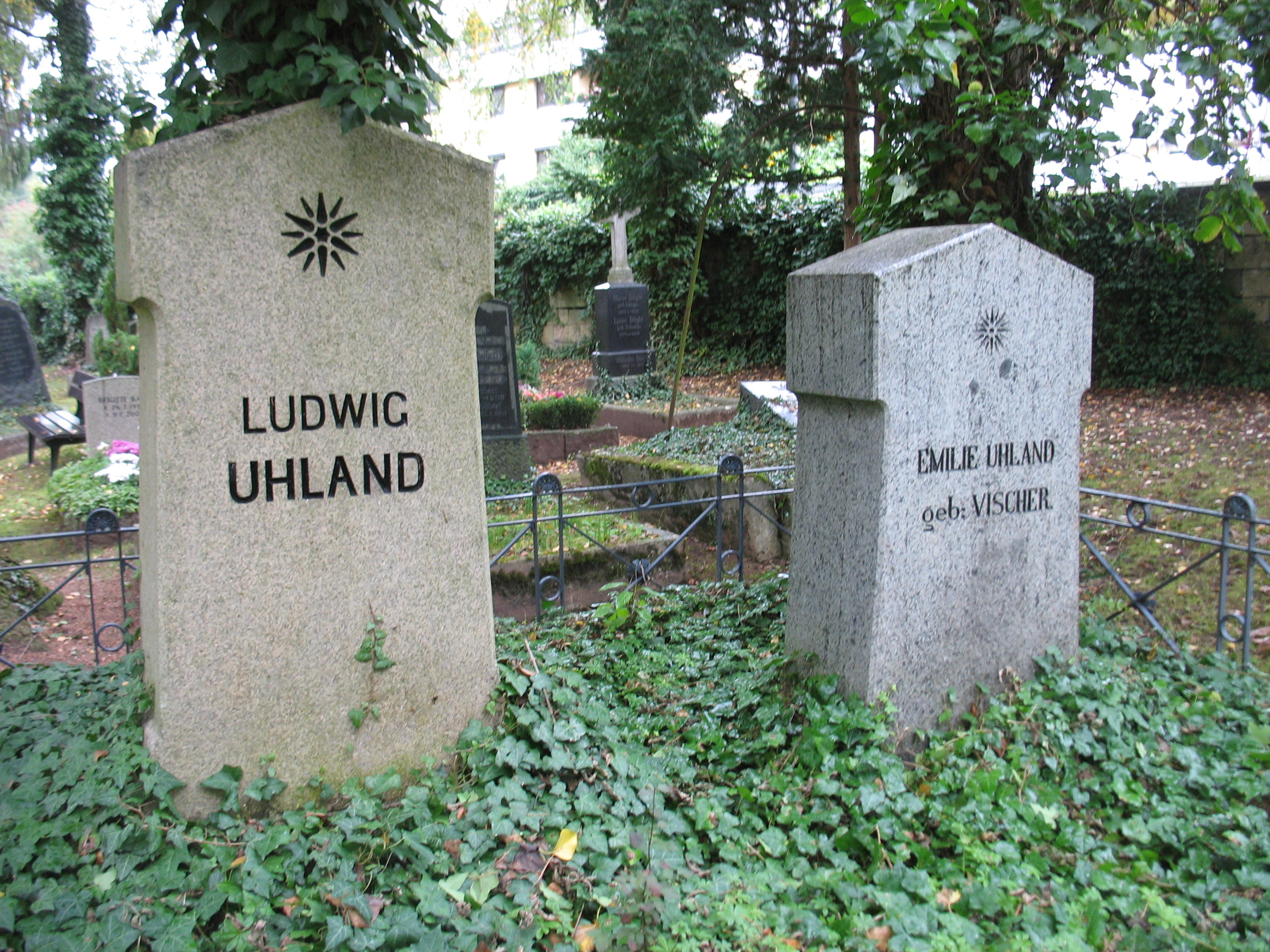 Grabsteine Ludwig und Emilie Uhland